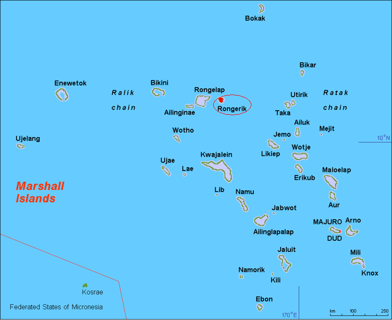 Mappa di Rongerik